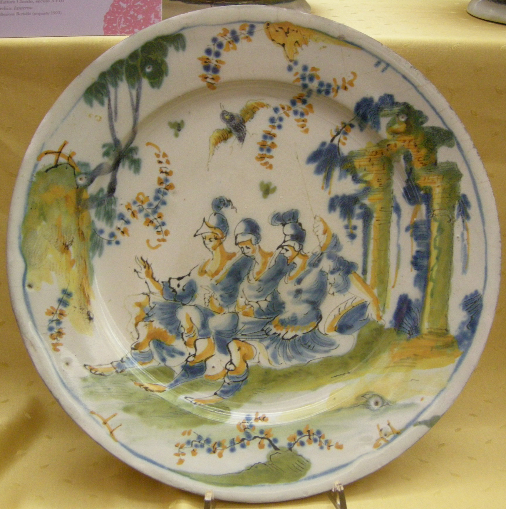 Albisola, piatto, manifattura conrado, secolo xviii